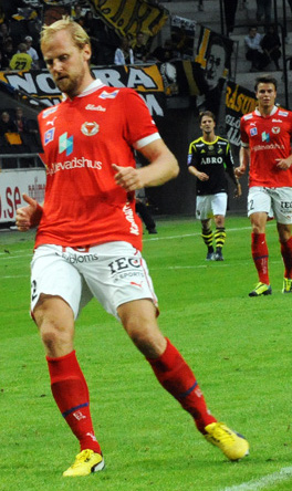 Markus Thorbjörnsson